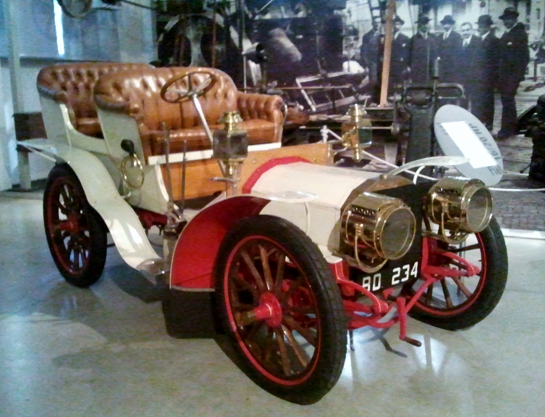 Fiat 16/20 HP "Phaeton" en el Centro Storico Fiat